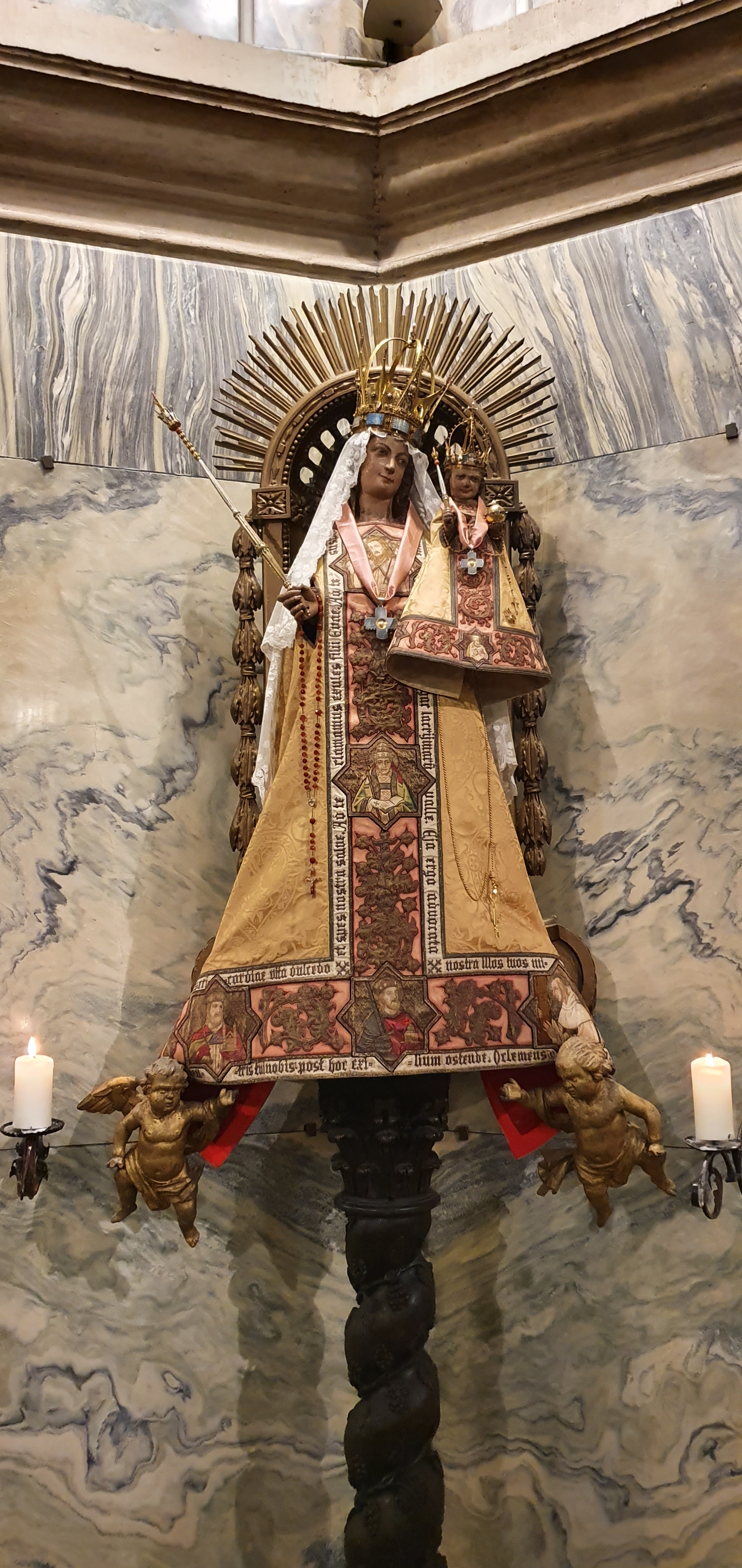 Aachener Dom, Aachener Gnadenbild (Marienfigur mit Kind) Januar 2020